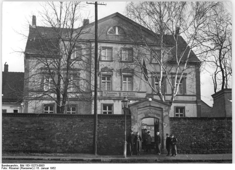 Zentralbild-Rösener Hein-Be. 15.1.52 Wählerauftrag erfüllt - neue Poliklinik in Magdeburg eingeweiht. Eine Poliklinik für den Magdeburger Vorort Salbke einzurichten, das war ein Wählerauftrag der Magdeburger Einwohner an ihre Kandidaten. Am 11.1.52 war dieser Wählerauftrag erfüllt. Im ehemaligen Gutshaus, in 71 hellen freundlichen Räumen, können sich ab 15.1.52 die Einwohner von Salbke behandeln lassen. UBz, Blick auf die neue Poliklinik in Magdeburg-Salbke.